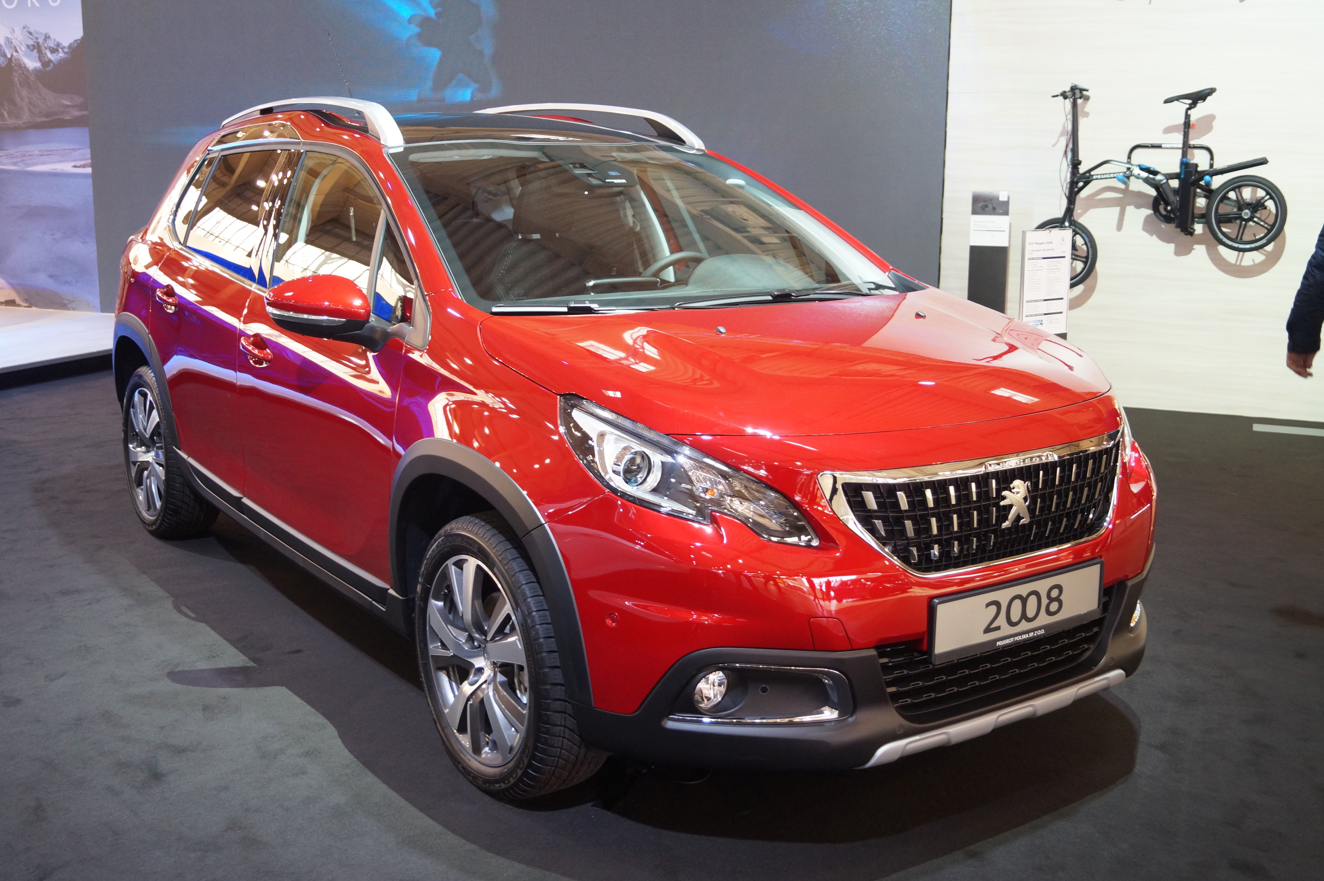 Prawy przód Peugeota 2008 na Motor Show Poznań 2017.